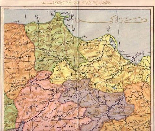 19. yüzyılda hazırlanmış Osmanlıca Orta Karadeniz haritası.